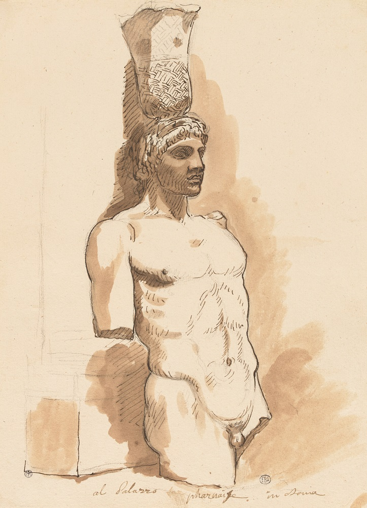 Pierre noire, plume et encre brune, lavis brun - 286 x 200 mm Paris, École nationale supérieure des Beaux-Arts Photo : ENSBA